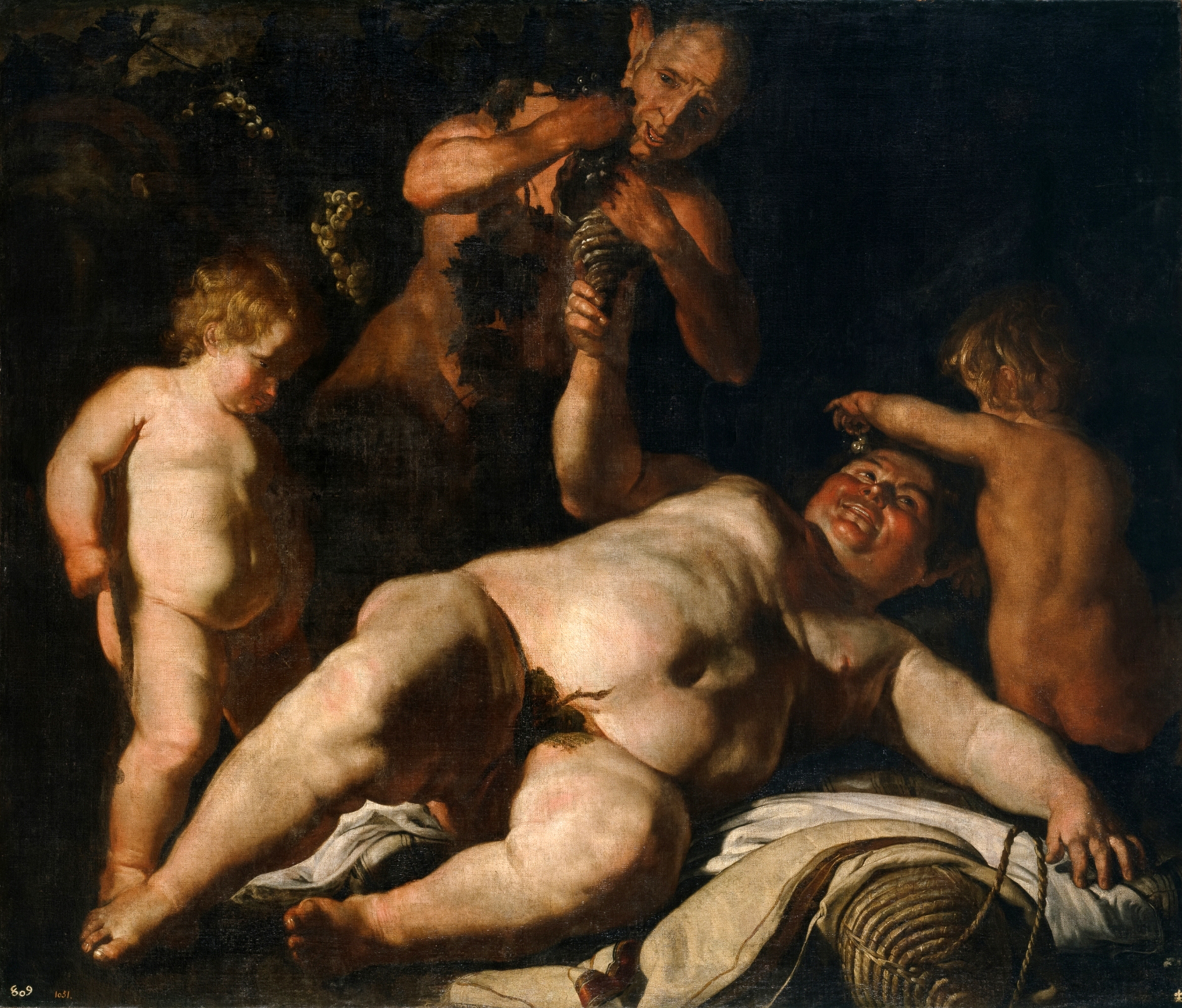 Un sátiro llena la copa de vino de Sileno, panzón y grotesco, quien mira sonriente a otro sátiro de espaldas. El tratamiento burlesco del mito clásico procede de Ribera, con quien Fracanzano colaboró desde en torno a 1630. Procede de la colección de la reina Isabel de Farnesio, donde figura en 1746, y se ignora su historia anterior.